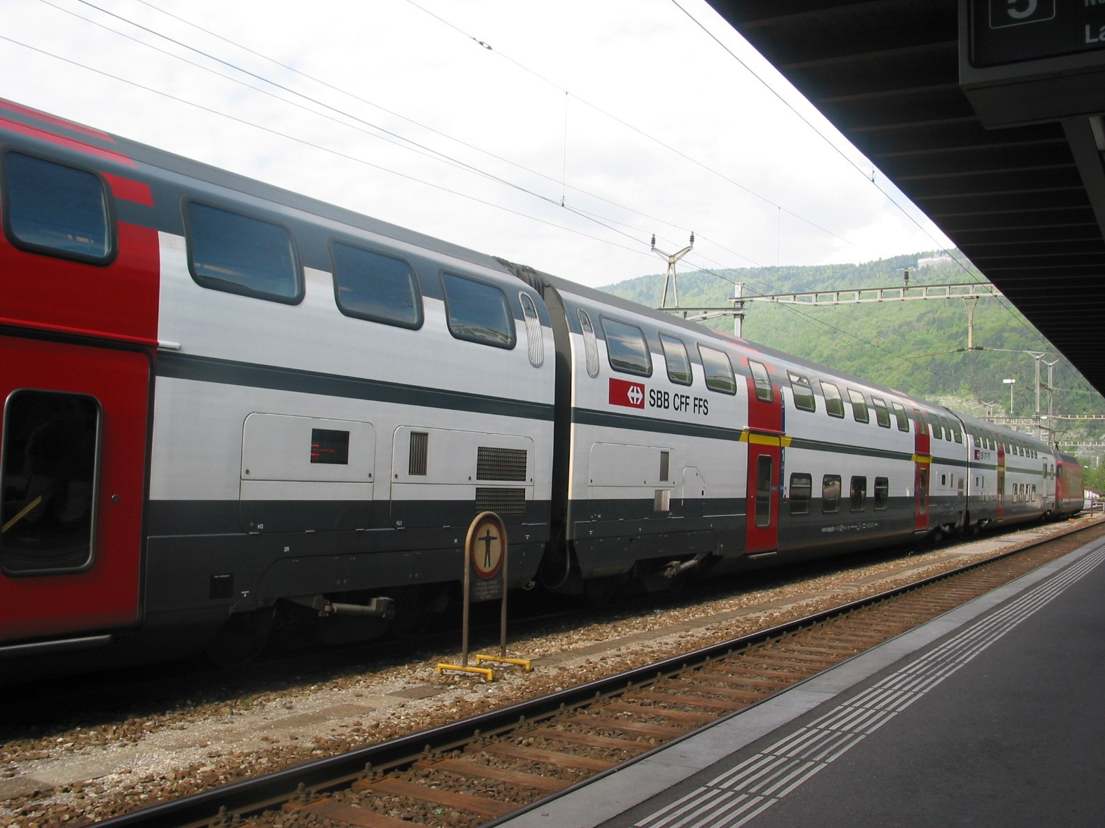 Tren de dos pisos en la estación de trenes de Biel-Bienne